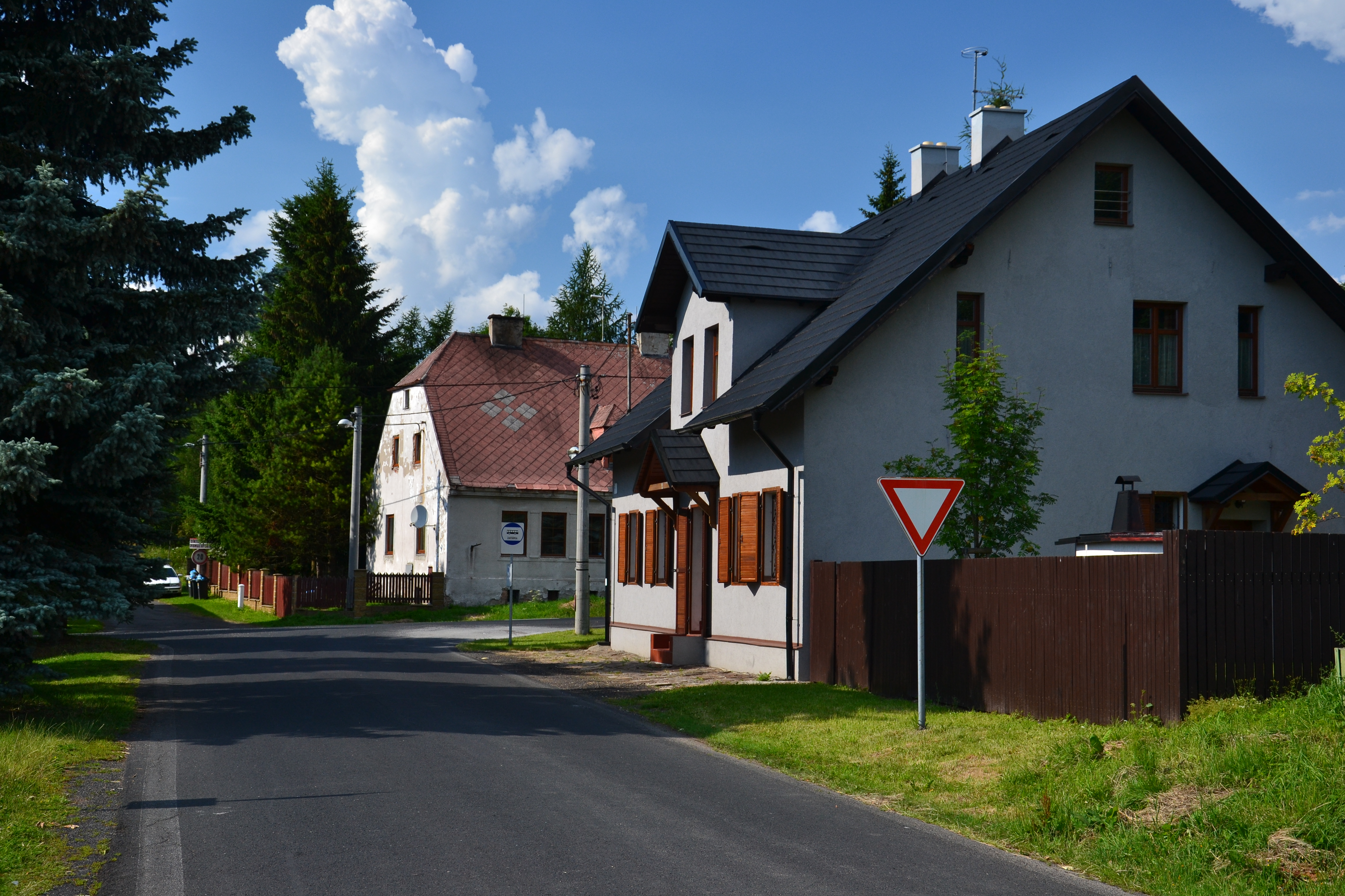 Domy u křižovatky